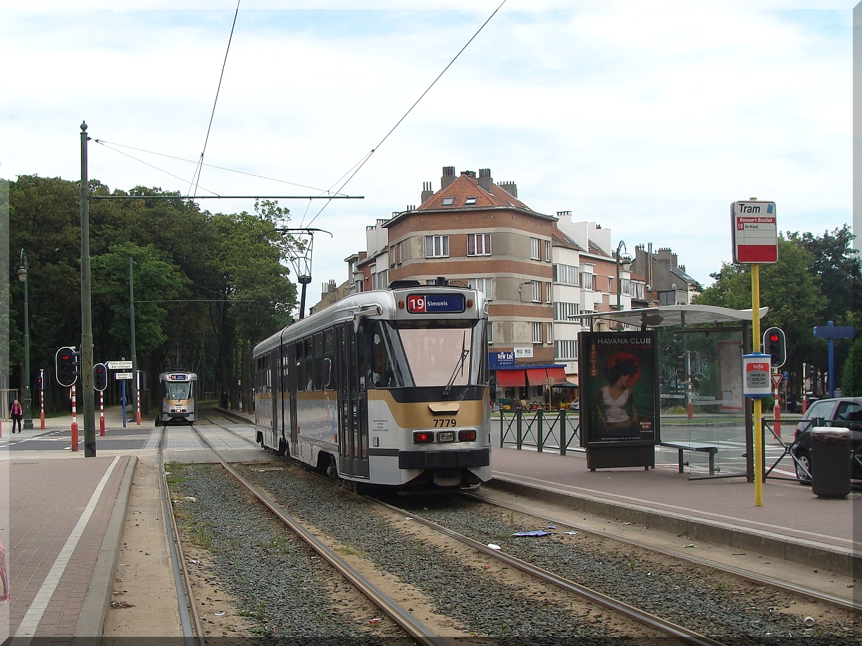 Motrice 7779 sur l'avenue du Panthéon vers Simonis